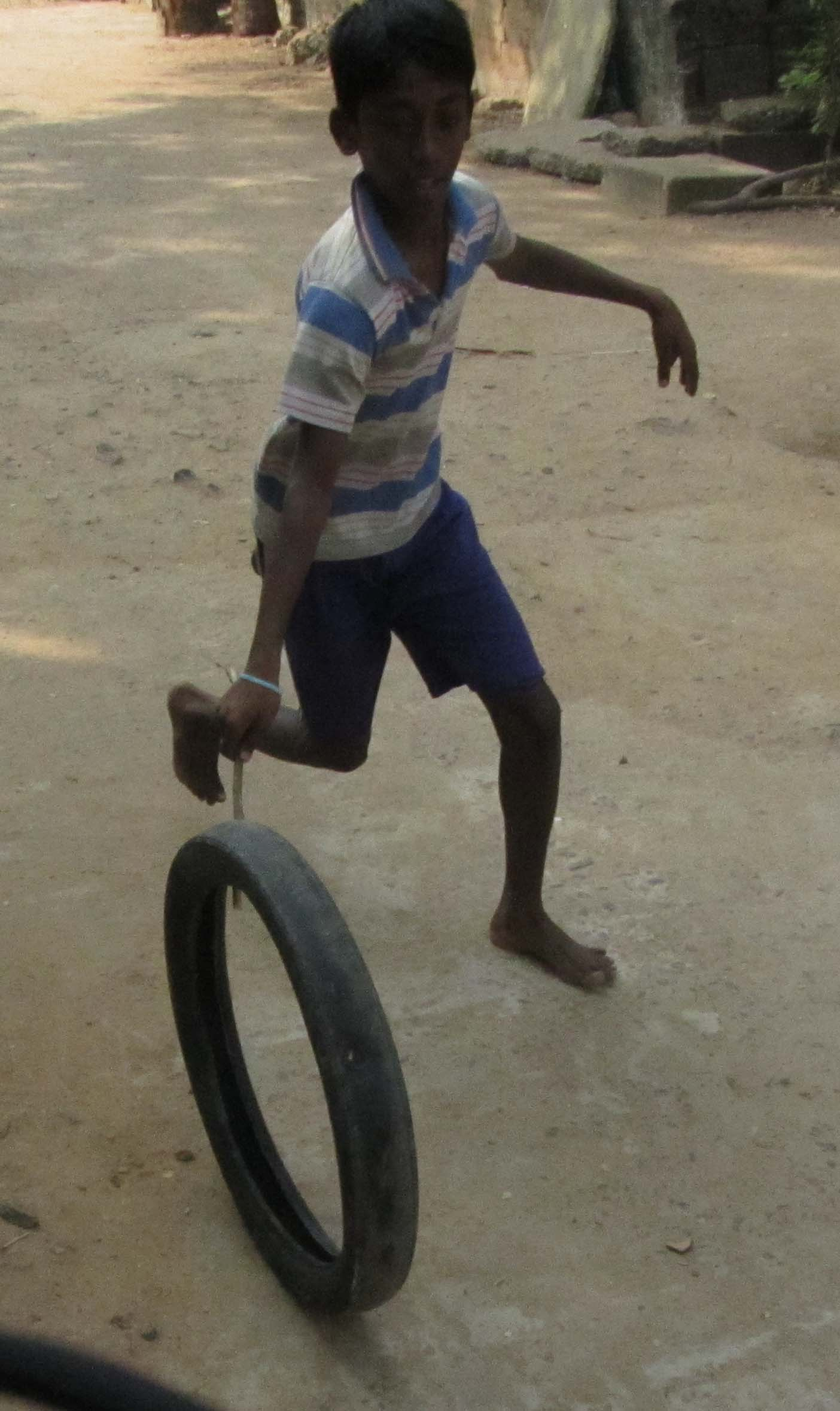 வளையம் உருட்டுதல் சிறுவர் விளையாட்டுகளில் ஒரு உல்லாச விளையாட்டு.